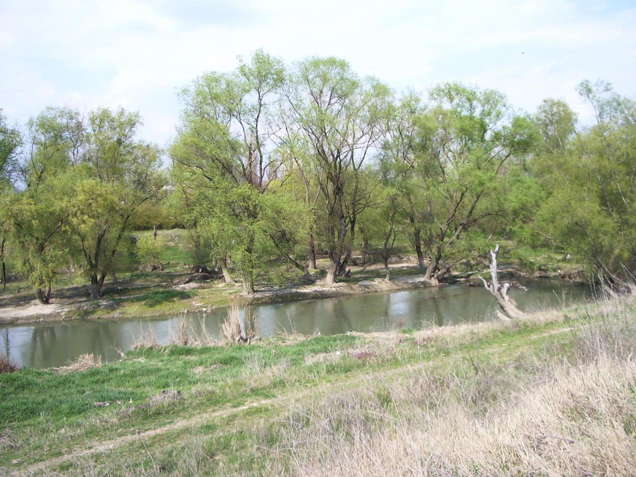 Десен ръкав на река Тунджа в Ямбол - изглед откъм Градския парк, близо до тенис кортовете (спортна площадка "Комсомолец")